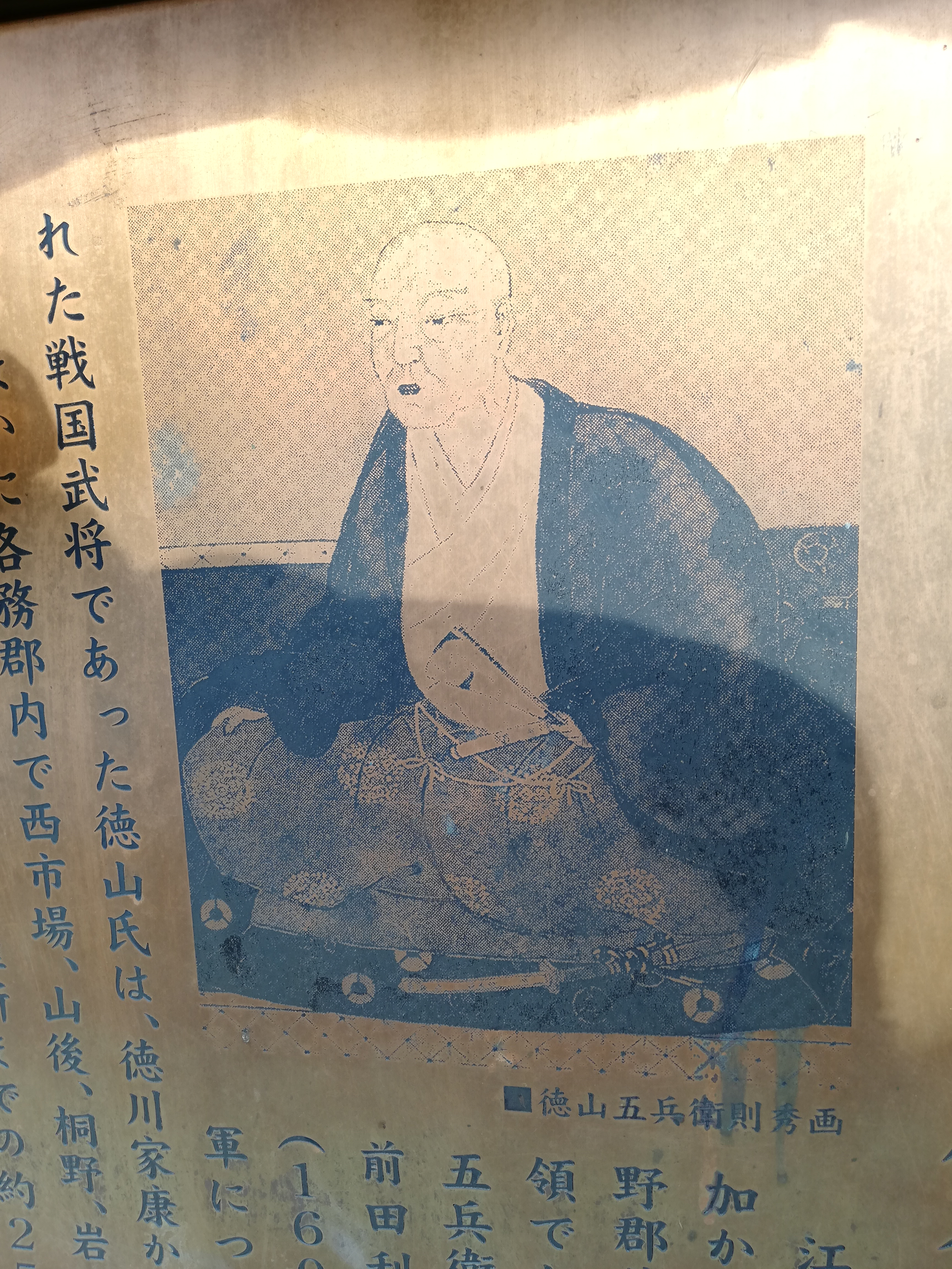 旗本徳山陣屋公園の説明板にある徳山則秀の肖像。